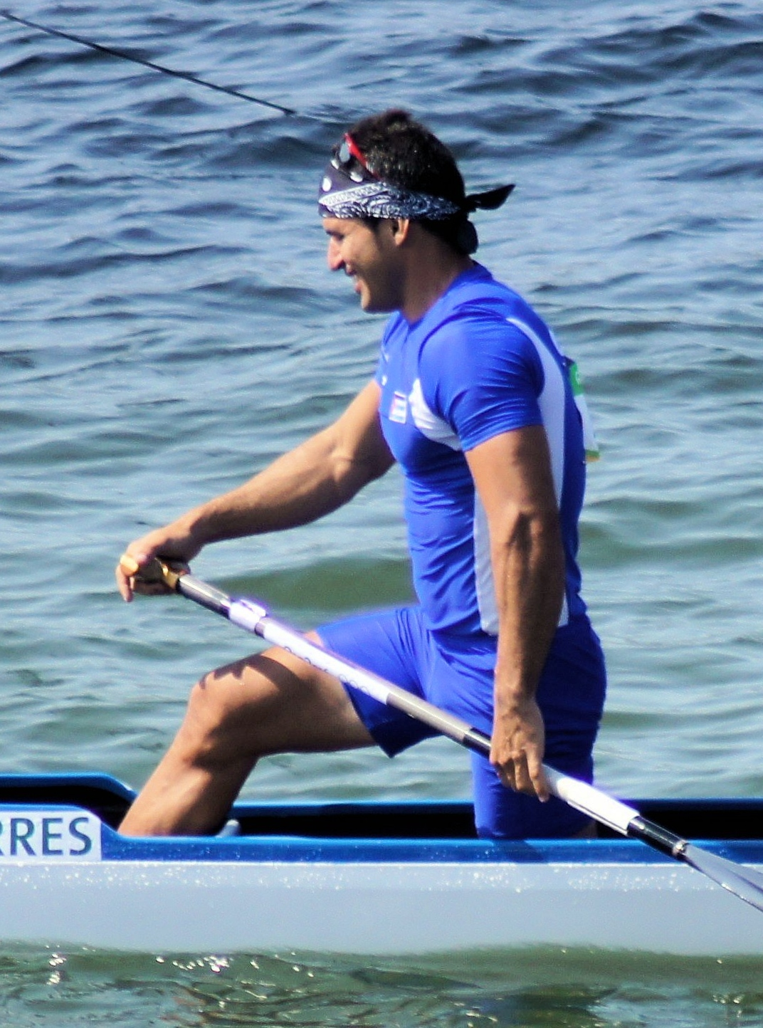 Rio 2016. Canoagem de velocidade/Canoe sprint